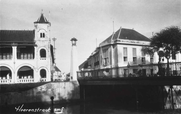 Foto. Semarang, Midden-Java, de Heerenstraat